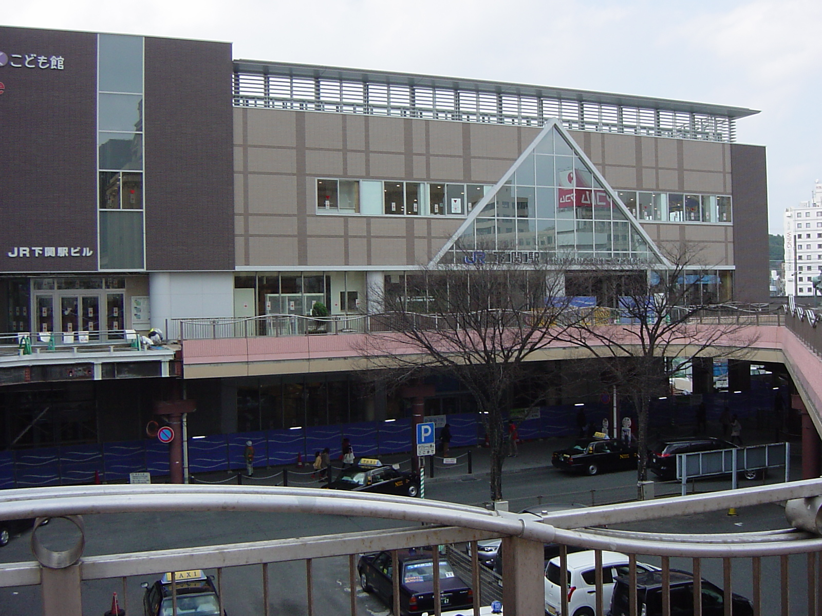 下関駅2014年